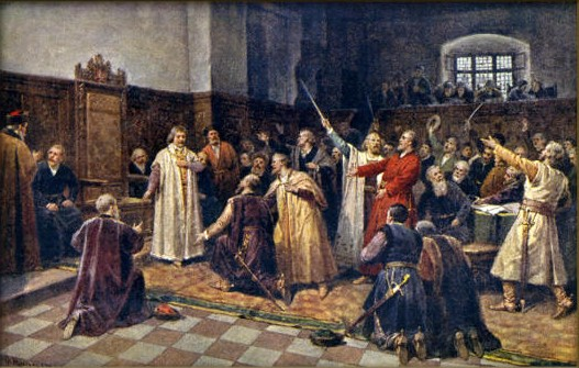 Josef Mathauser - Zvolení Jiříka z Poděbrad králem českým roku 1458